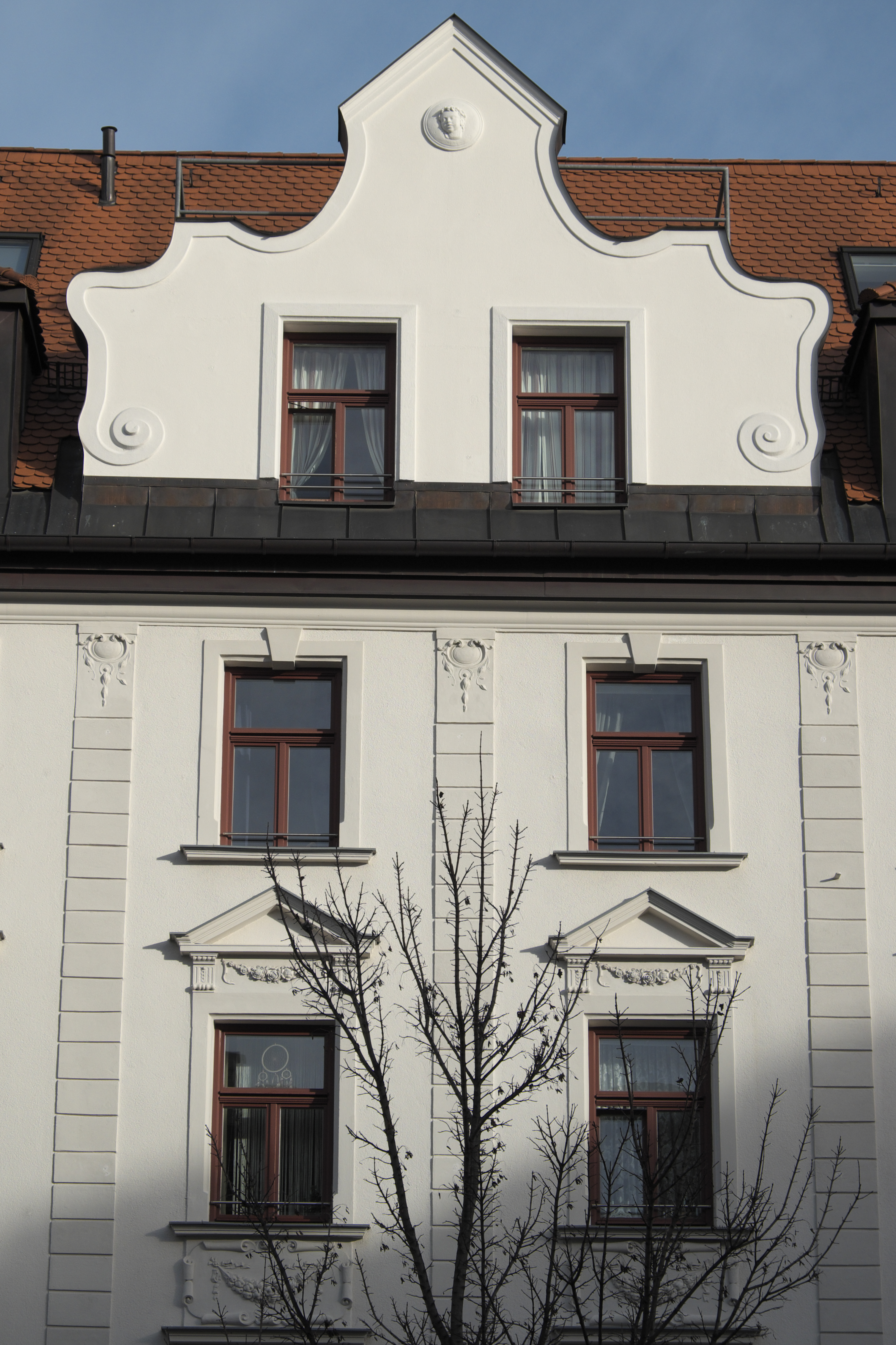 Mietshaus in der Donnersbergerstraße 42 in Neuhausen im Stadtbezirk Neuhausen-Nymphenburg in München (Bayern/Deutschland), um 1900